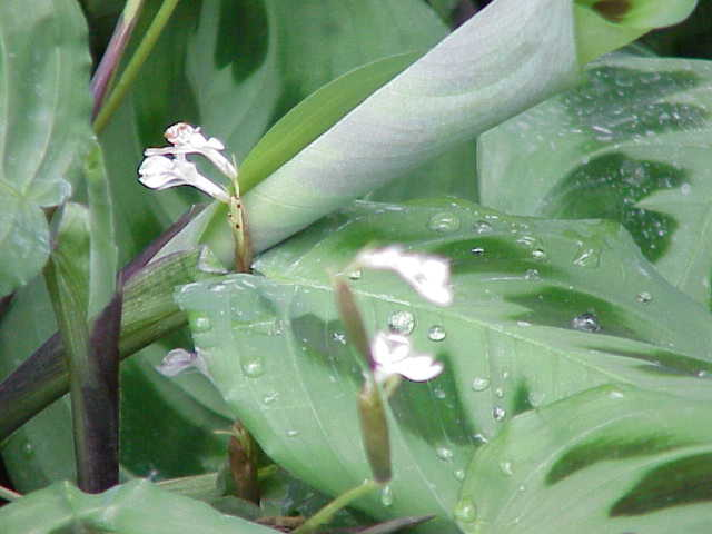 Species: Maranta leuconeura Family: Marantaceae Image No. 3